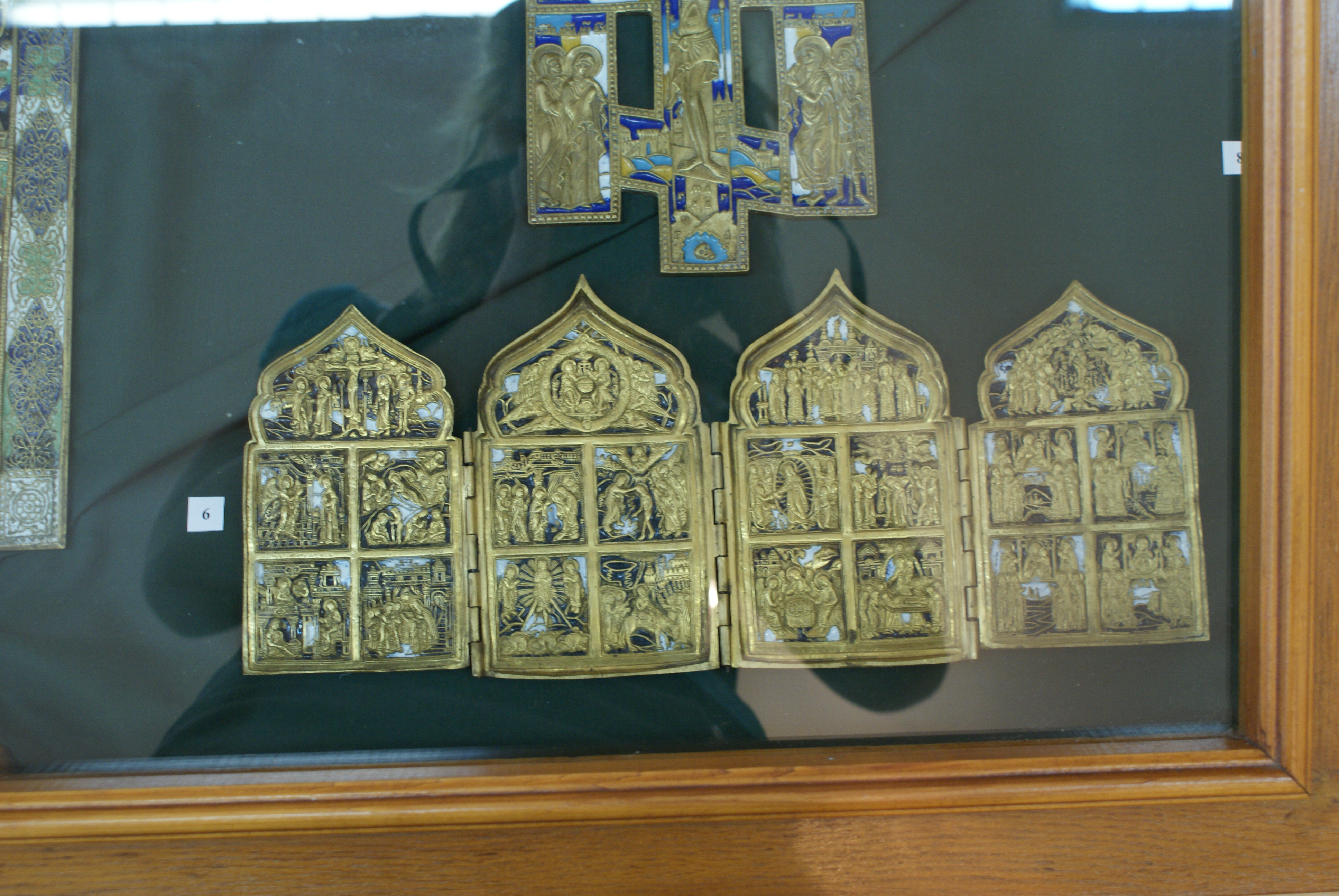 Складзень чатырохстворкавы "Двунадзесятыя святы" XIX ст. Расія, медны сплаў, ліцё, эмаль